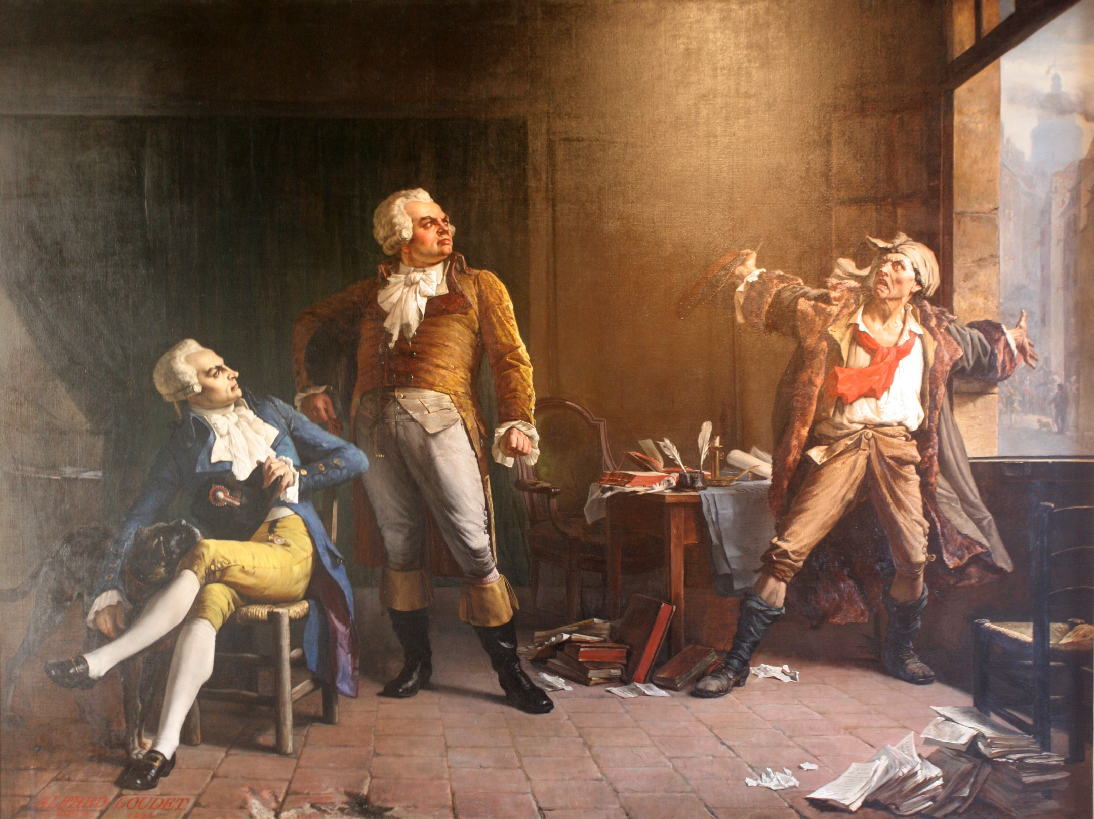 Marat ayant une conversation animée avec Danton (debout) et Robespierre (assis) par Alfred Loudet, 1882.